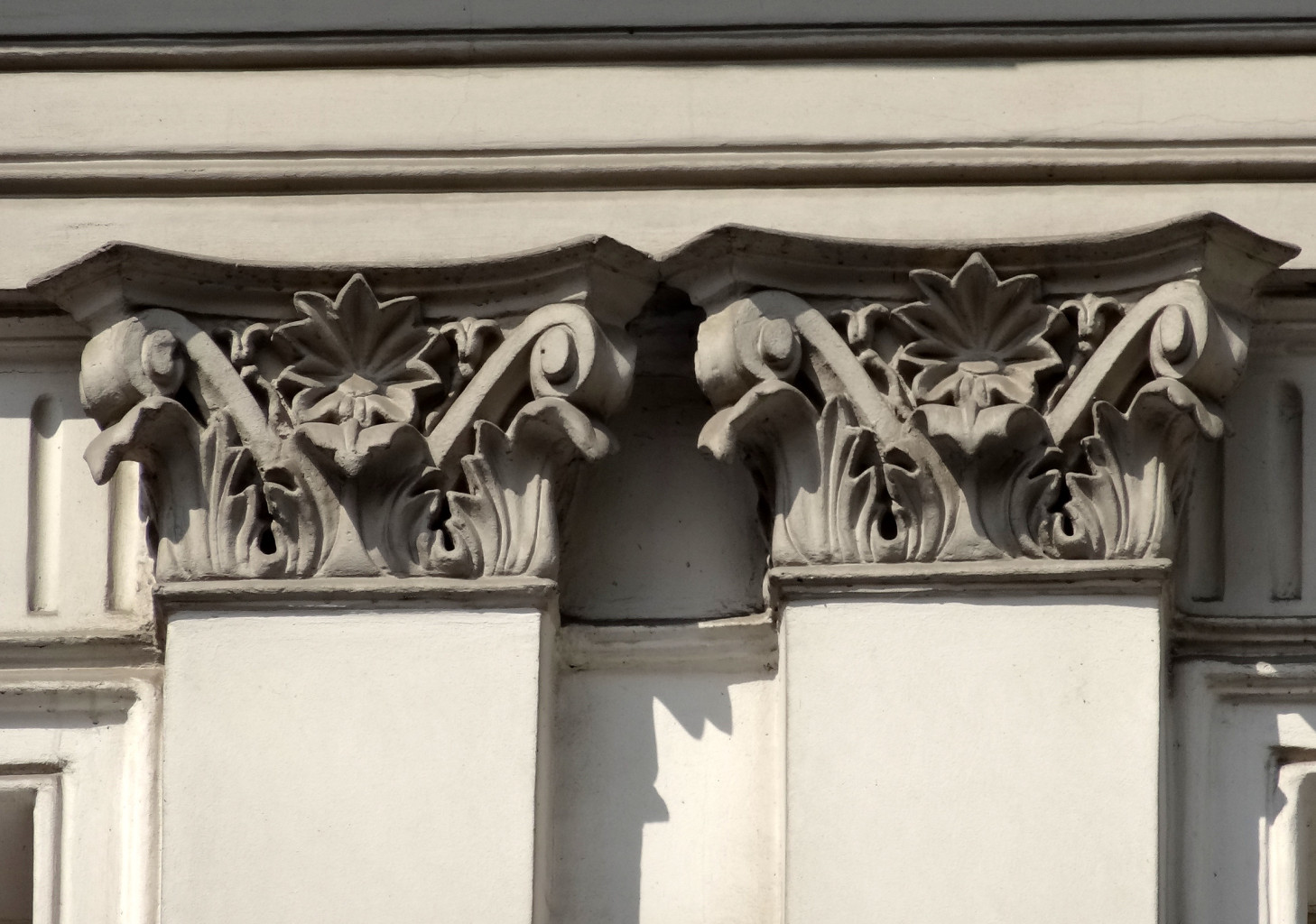 Ulica Długa na Starym Mieście w Bydgoszczy. Zdobienia elewacji kamienic.